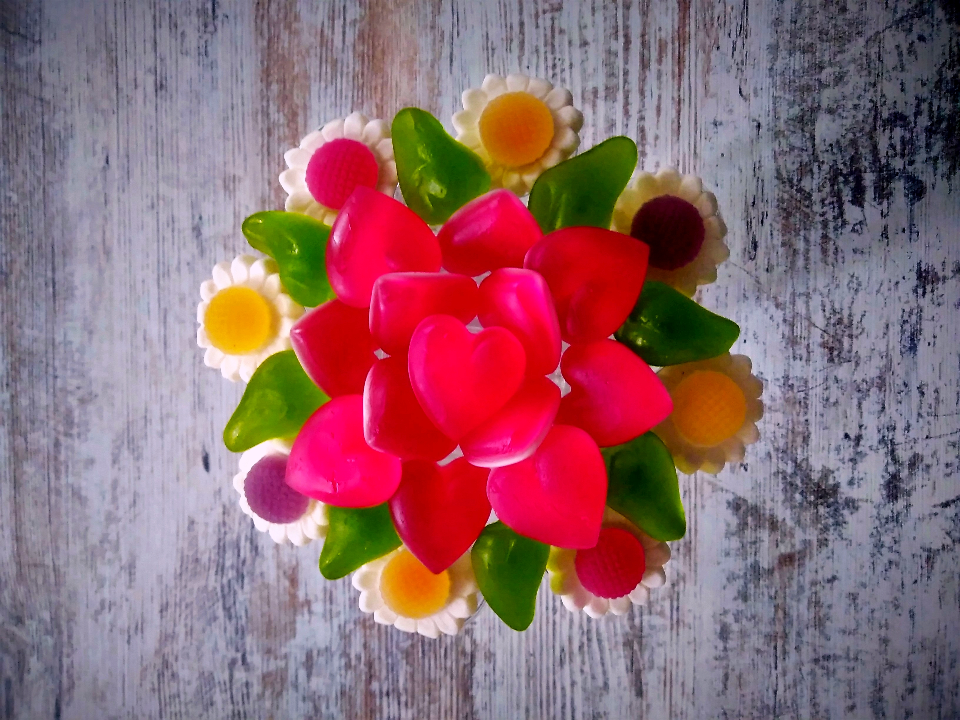 Eine Blume aus Fruchtgummi.